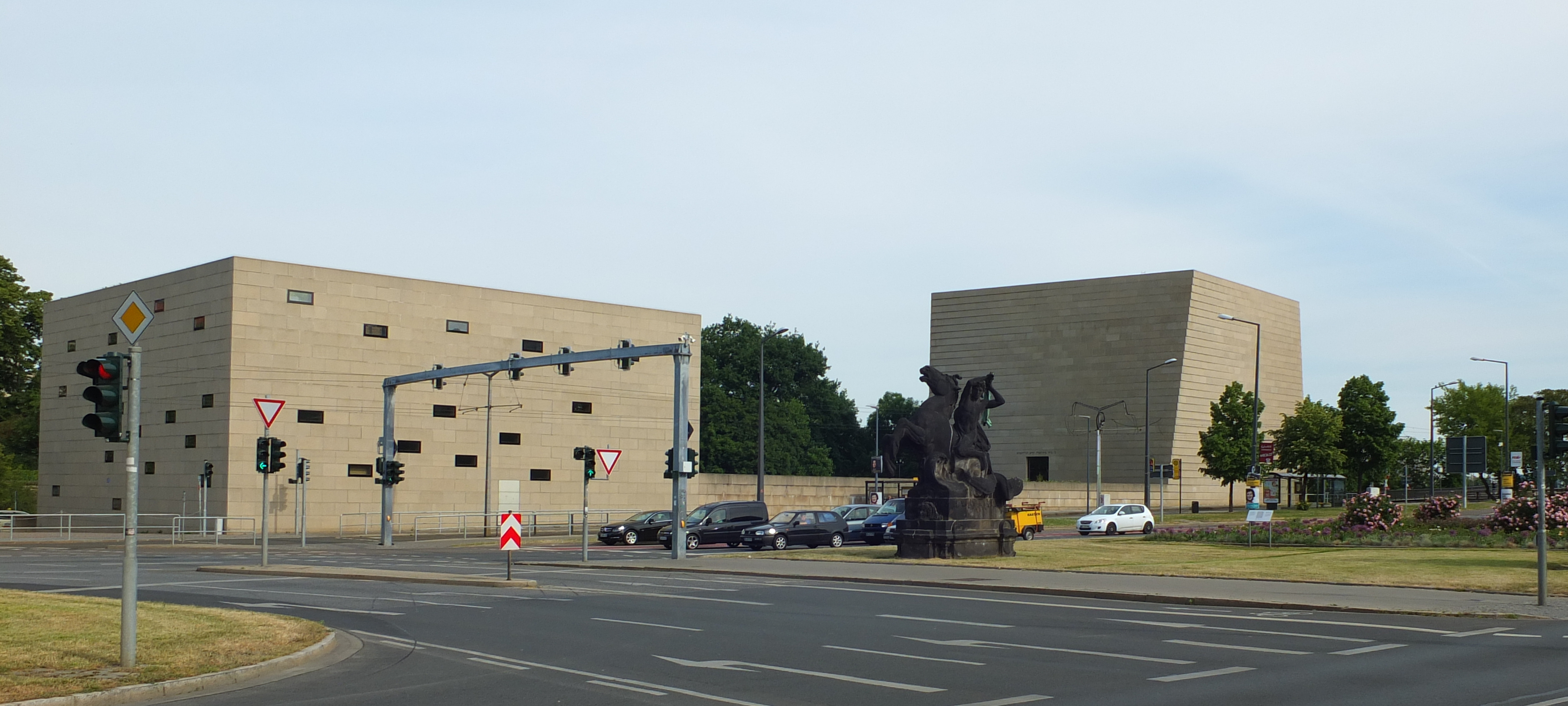 Neue Synagoge in Dresden, Duitsland. Op de voorgrond het beeld Elbe in Bewegung (Triton schwingt seine Keule bei der Jagd über die Wellen) (1907) van Friedrich Offermann.